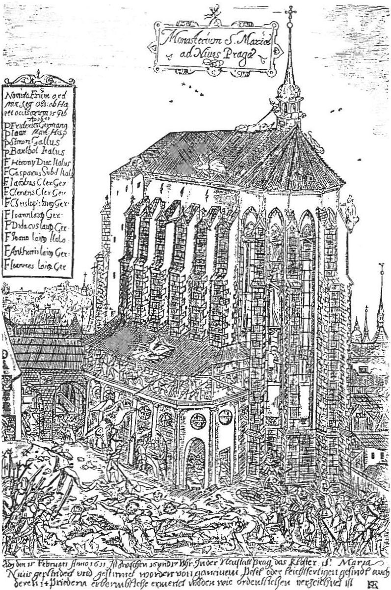 Čtrnáct pražských mučedníků